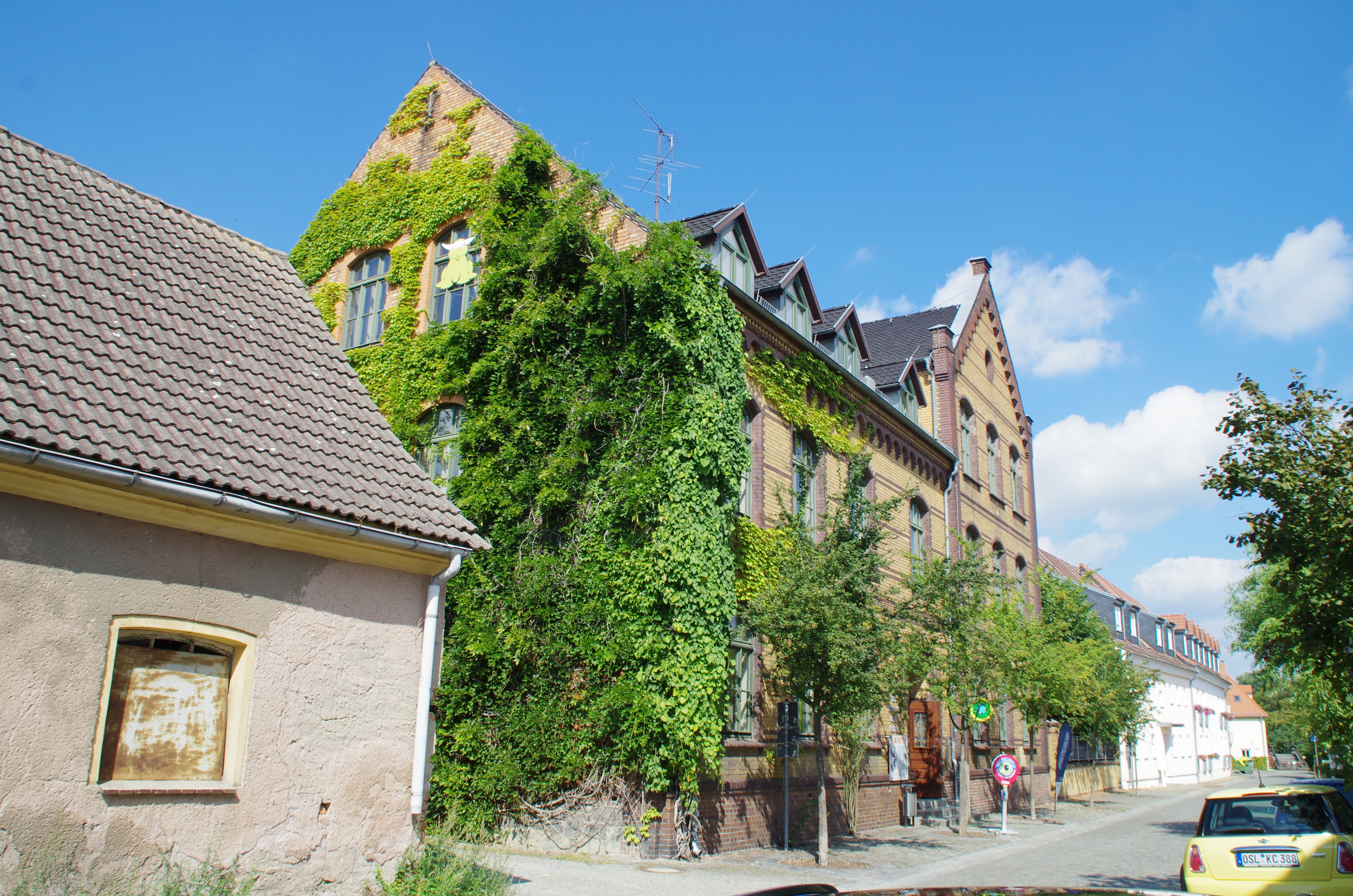 Lübbenau/Spreewald in Brandenburg. Das Haus in der Schulstraße 9 steht unter Denkmalschutz.